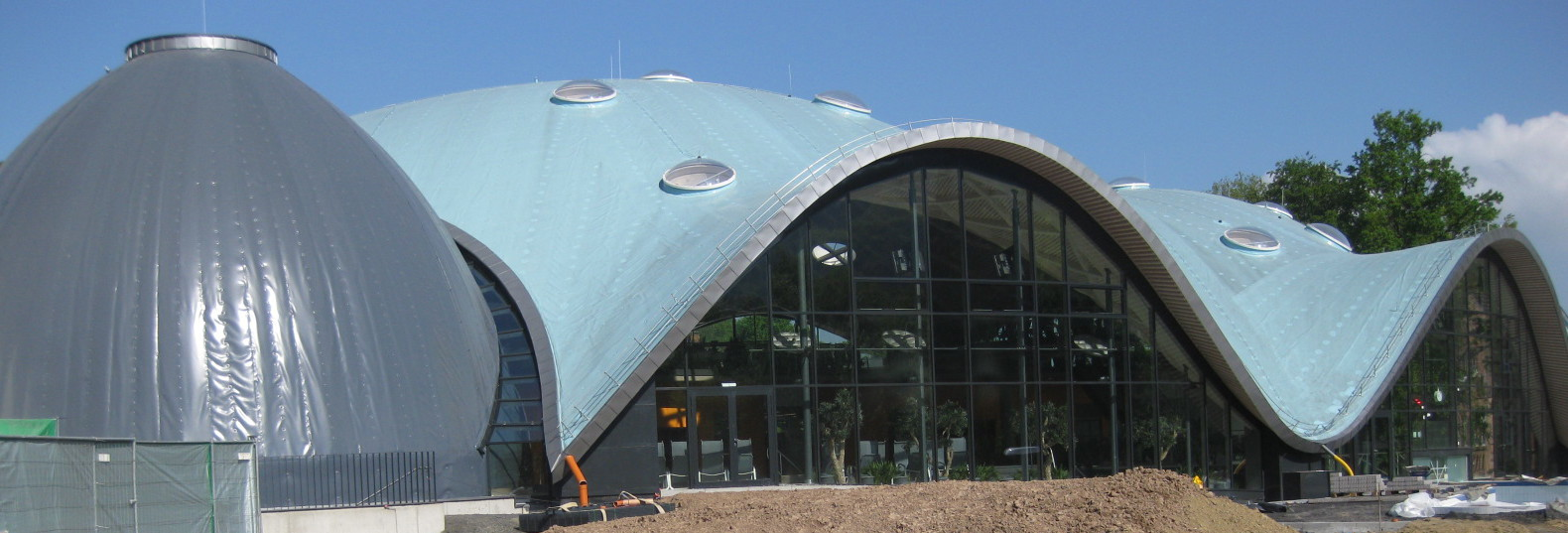 Bad Orb: Toskana Therme, Mai 2010, Ansicht vom Kurpark